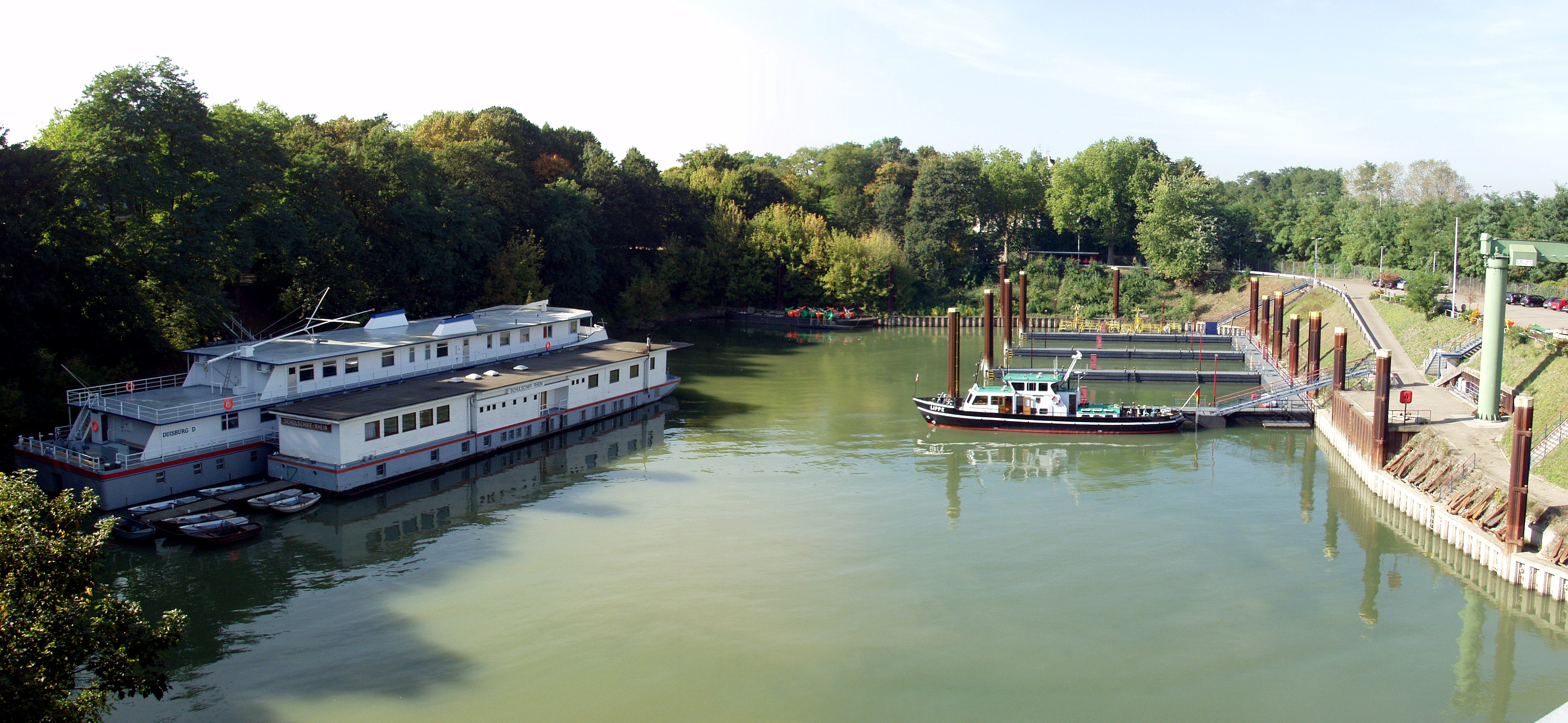 Ehemaliger Eisenbahnhafen (Homberger Seite) des Trajektes Homberg-Ruhrort (heute beide zu Duisburg gehörend). Rechts die Lippe, links das Schulschiff Rhein und die Duisburg D.